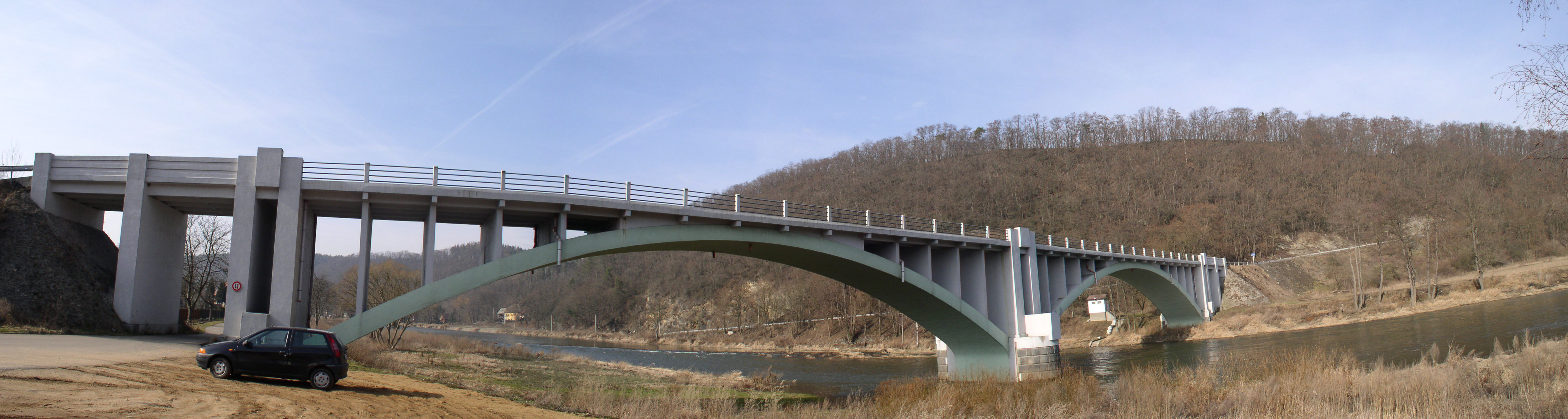 Liblínský most - panorama